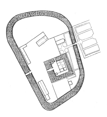 Grundplan der Kommende Welheim (Bottrop) an der Emscher